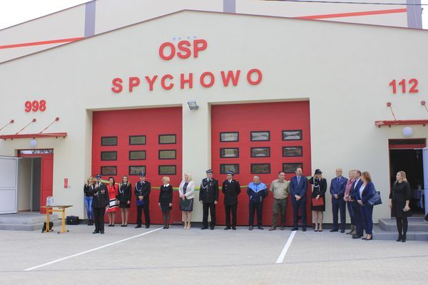 Osp w Spychowie